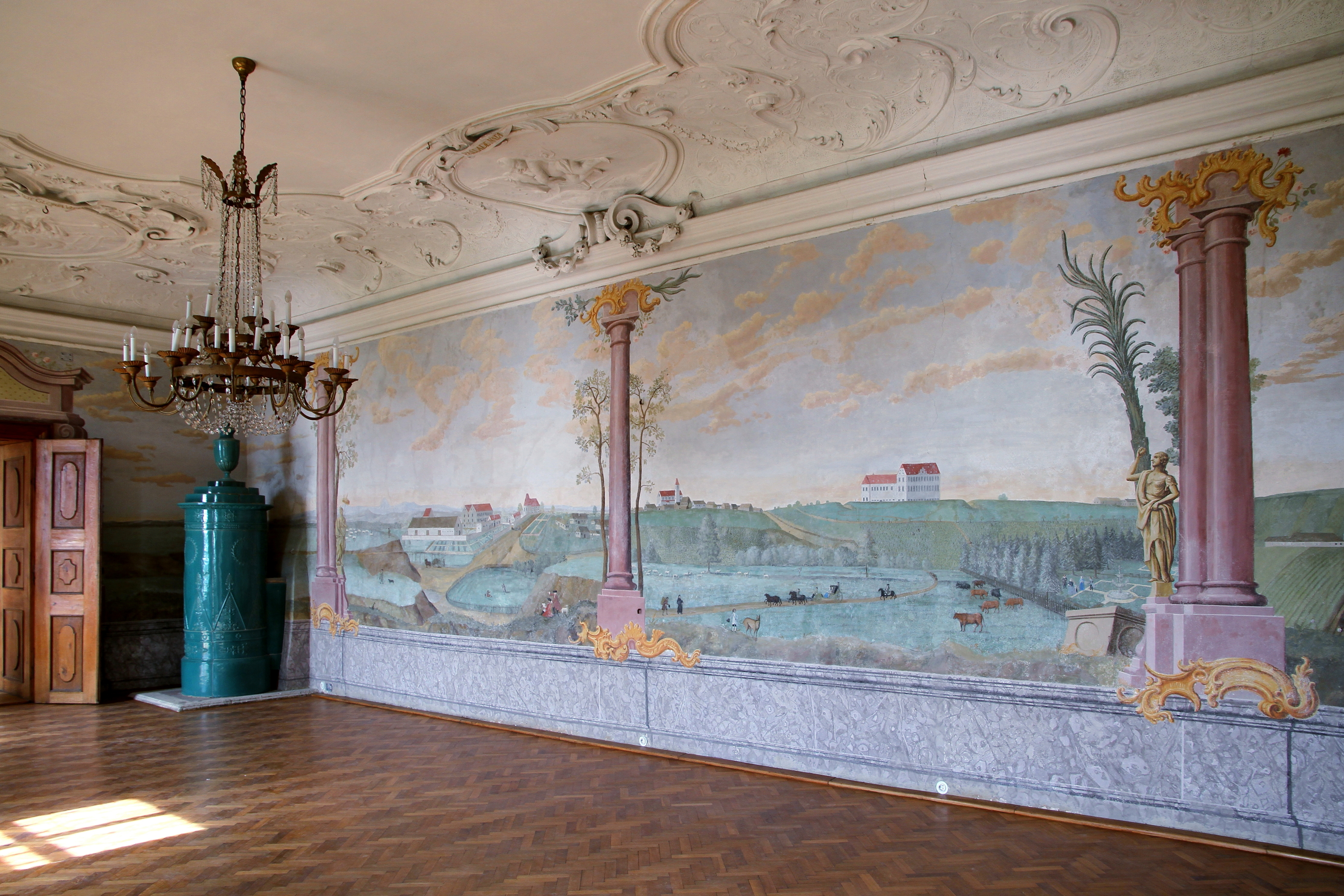 Wiederhergestellte Wandmalerei in einem Zimmer im 1. Stock des Haupttraktes des Schlosses Juliusburg, auch als Schloss Stetteldorf bezeichnet, in der niederösterreichischen Marktgemeinde Stetteldorf am Wagram.